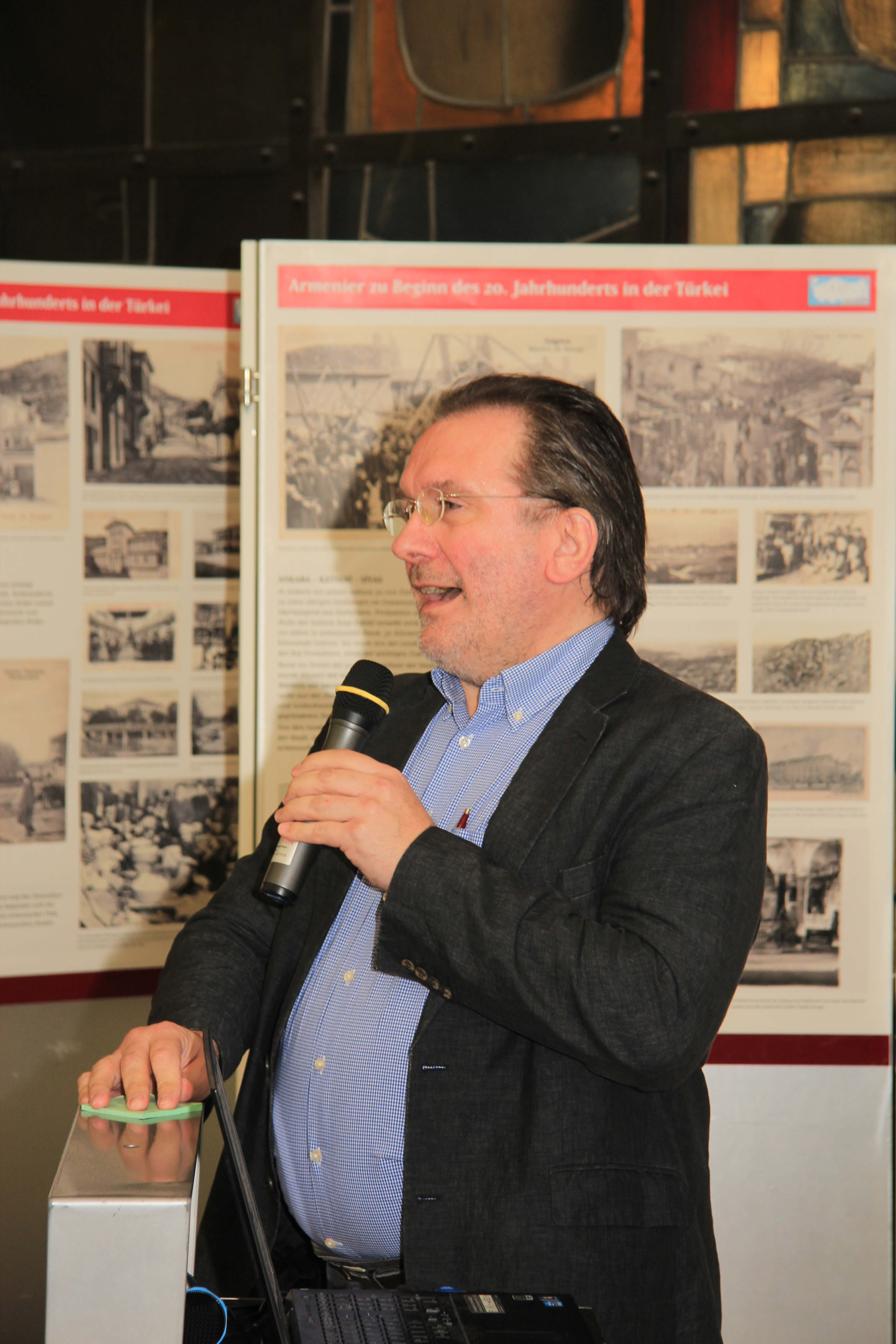 Eröffnung der Plakatausstellung über den Ersten Weltkrieg erstellt im Rahmen eines Projektes Ausstellung Krieg an der Wand von WMAT mit der Universität Wien